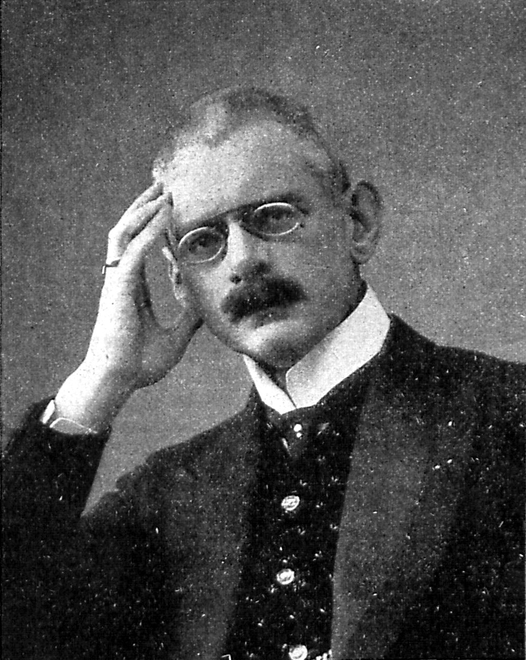 Major a. D. Adolf von Tiedemann, gest. 7. April 1915